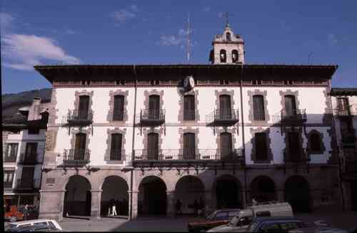 Casa Consistorial (convento de San Agustín)